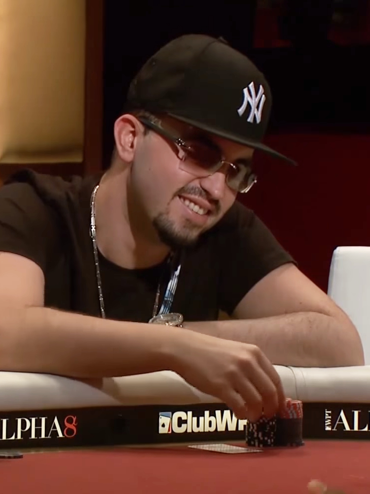 Bryn Kenney beim Season 2 WPT Alpha8 Florida